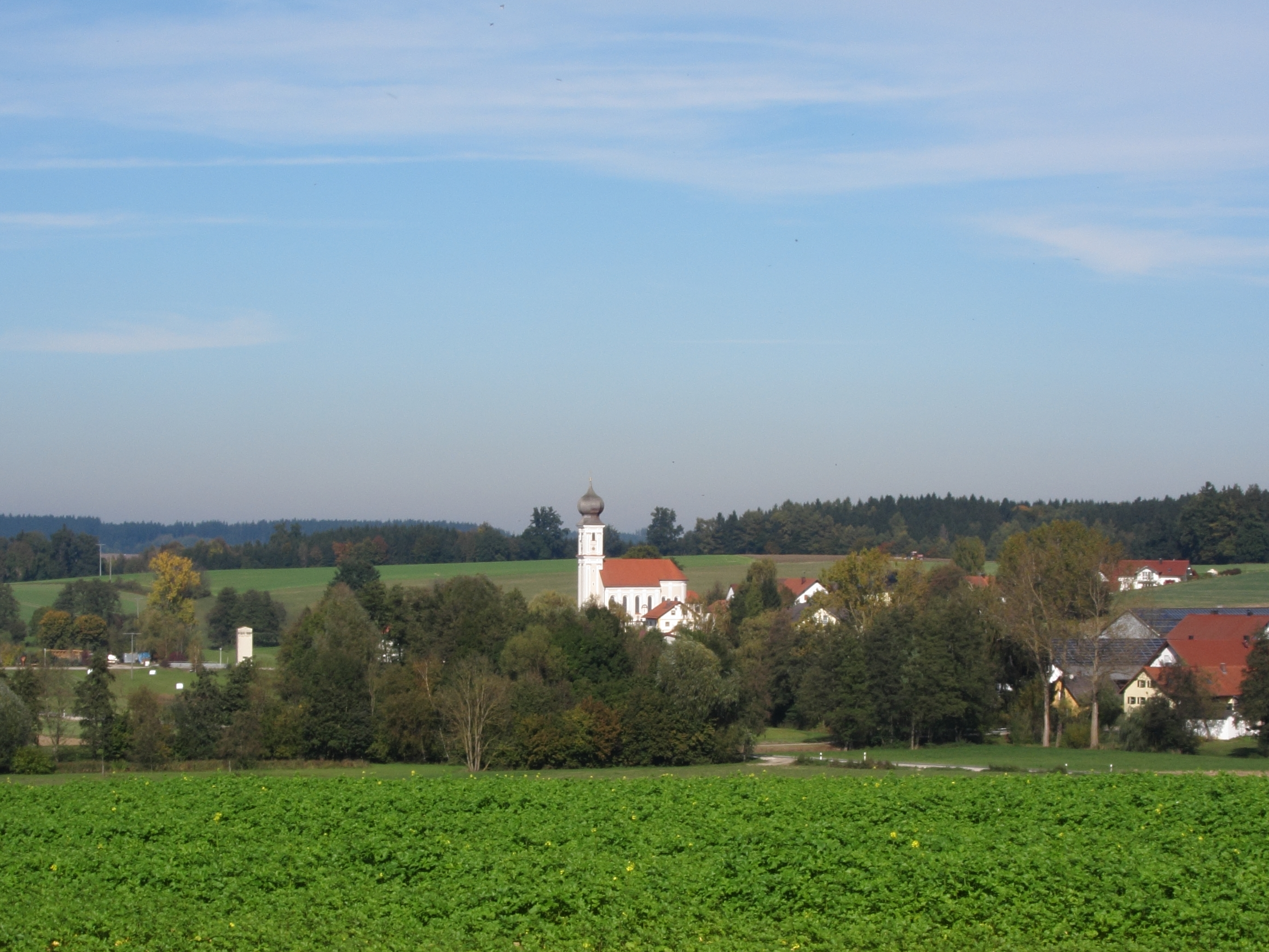 Burgharting; katholische Pfarrkirche St. Vitus, in spätbarockem Stil von Anton Kogler, 1723; mit Ausstattung.